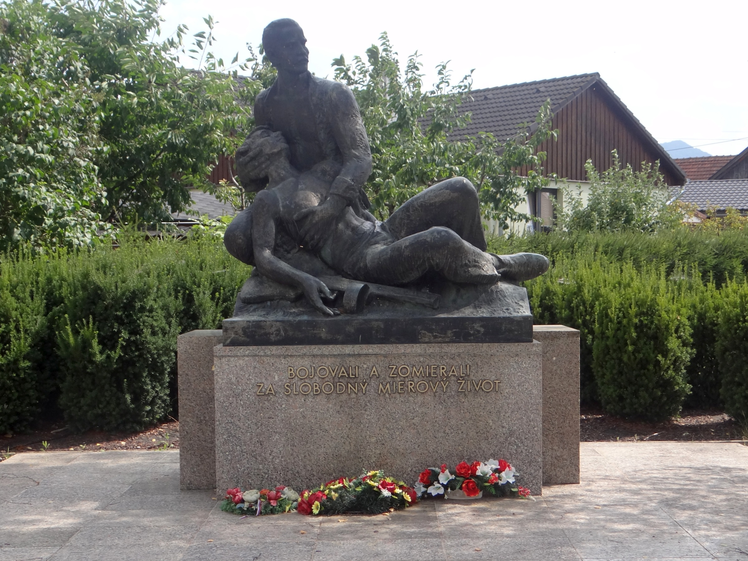 Sučany. Pomnik na rynku